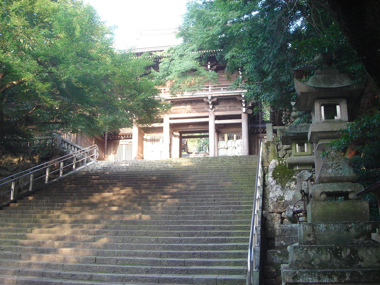 Inaba Jinjya(Shrine)(伊奈波神社の楼門),Gifu,Gifu,Japan(岐阜県岐阜市)で撮影。